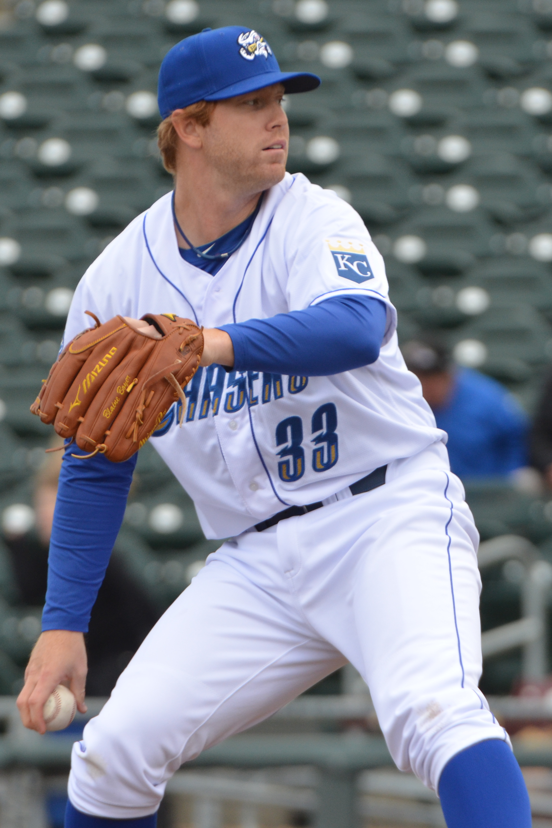 Blaine Boyer